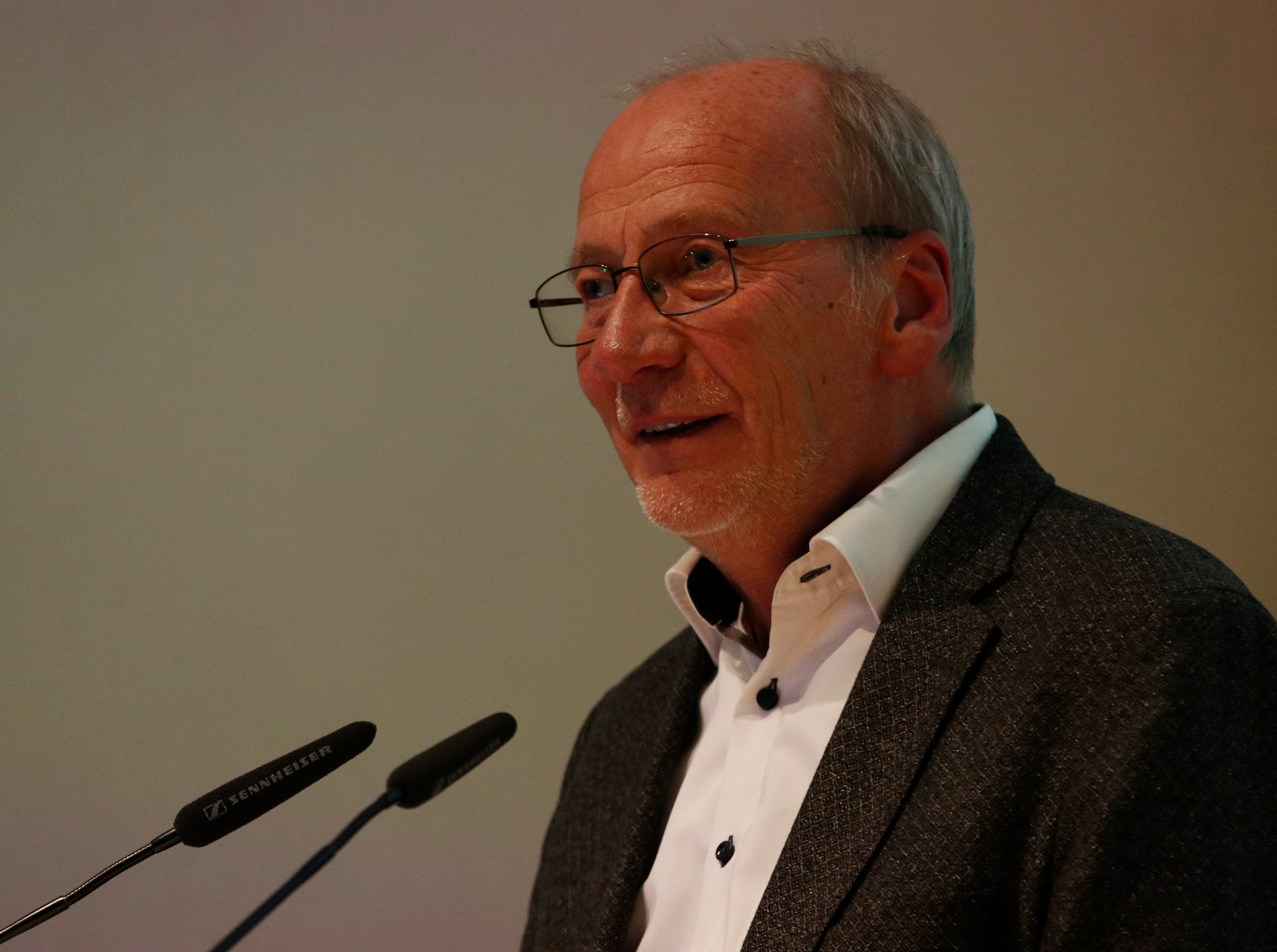 Hans-Georg Küppers, Kulturreferent der Landeshauptstadt München, bei einer Ausstellungseröffnung im NS-Dokuzentrum, 2019-05.29